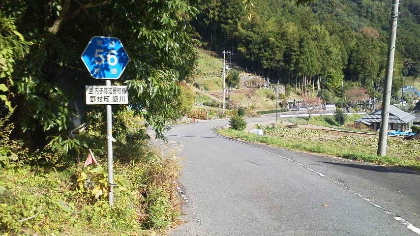 愛媛県道56号内子河辺野村線の西予市側端点。